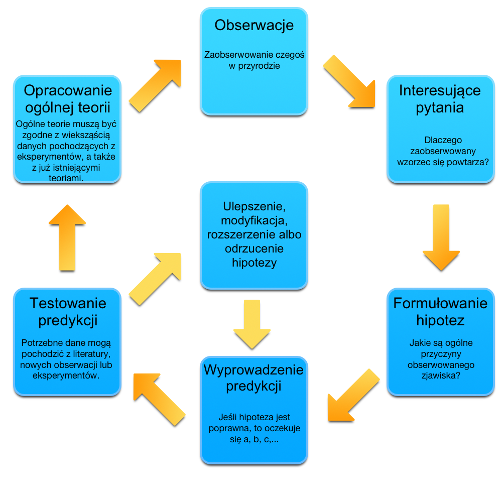 Schemat metody naukowej